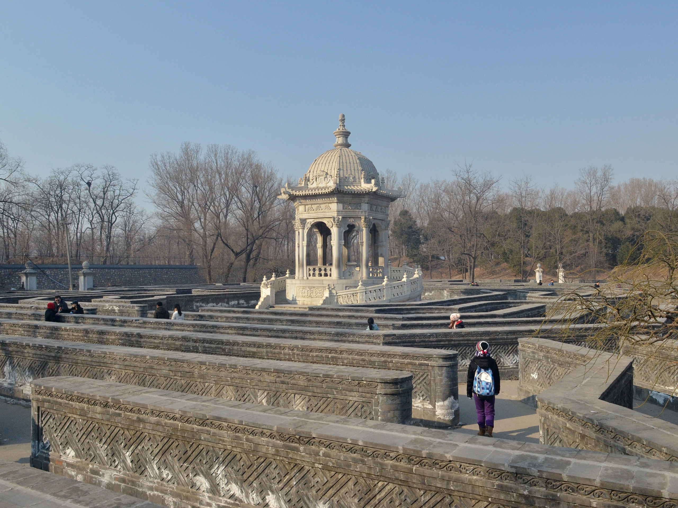 中文（中国大陆）: 长春园西洋楼黄花阵, 也称万花阵, 于1987年,1989年在原址修复阵墙和中心亭.